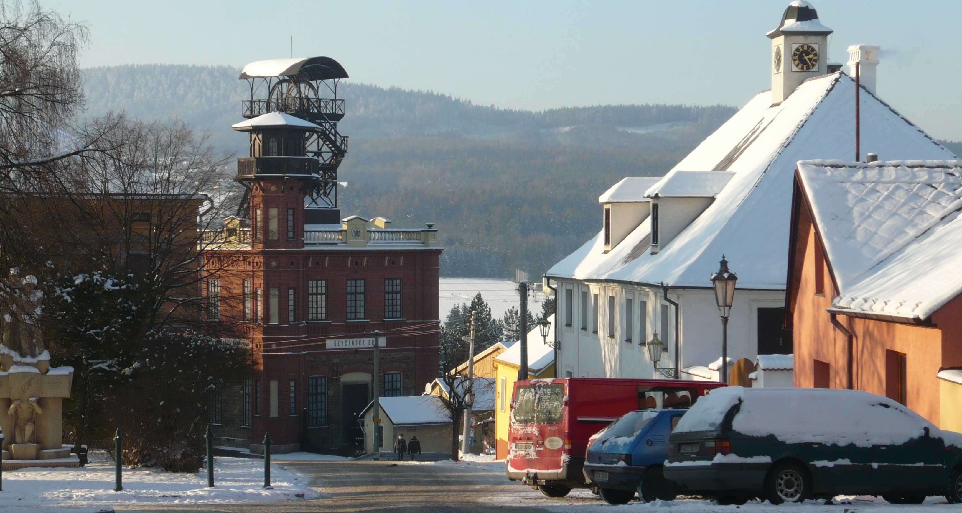 Česky: Ševčínský důl v zimě